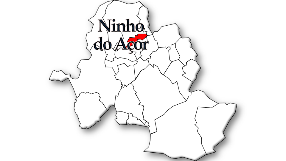 População